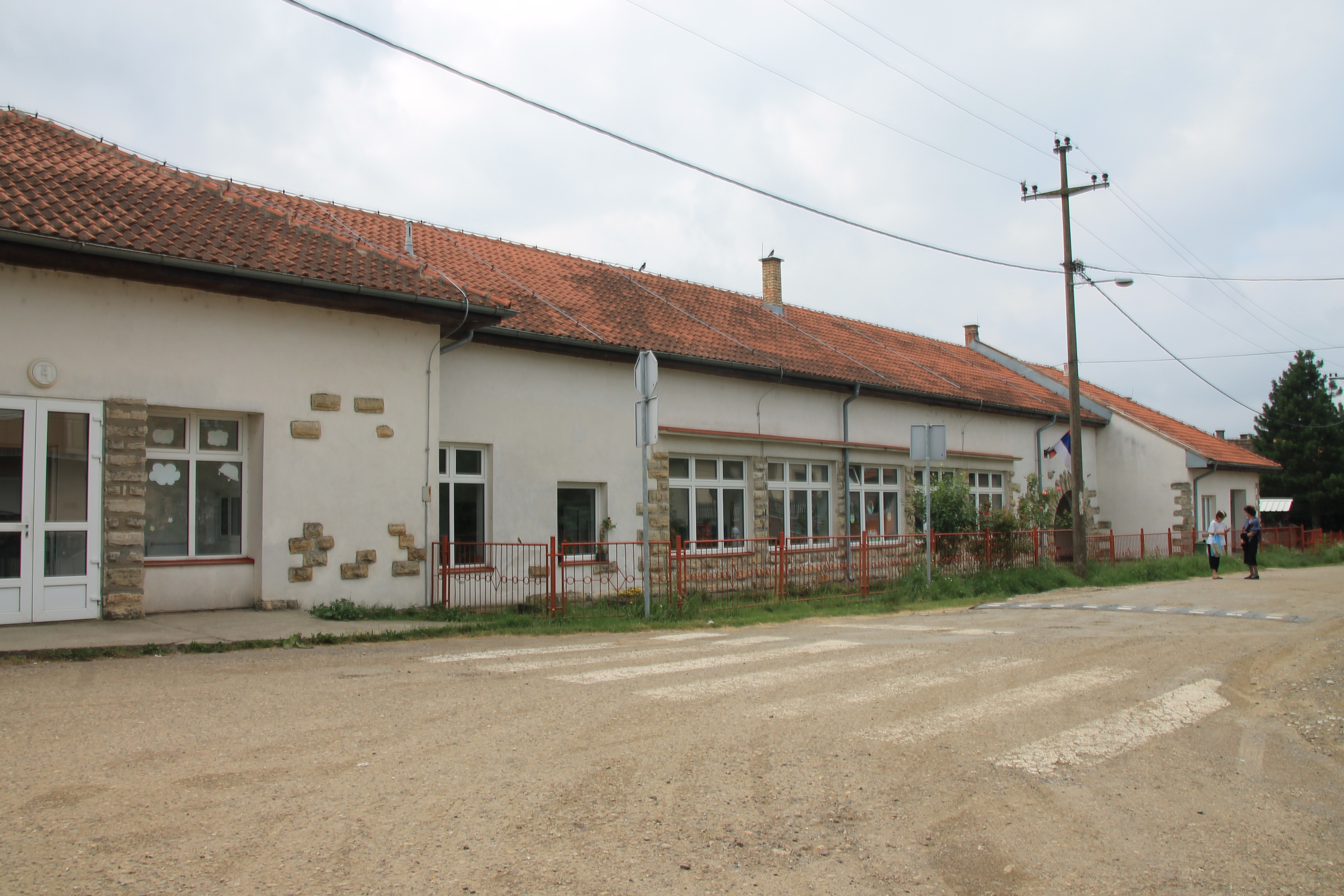 Arnajevo